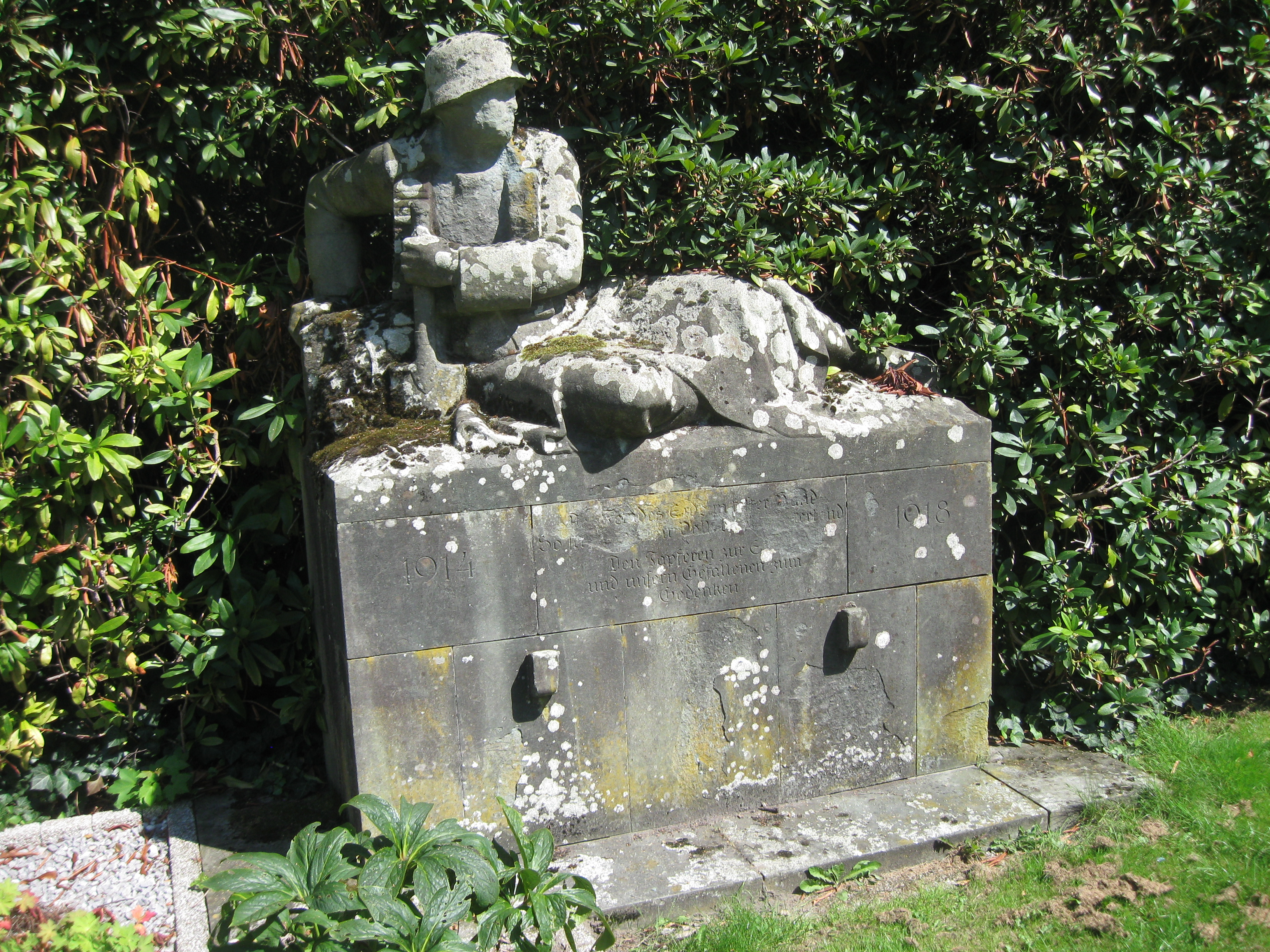 Kriegerehrenmal "liegender Krieger" von Hermann Hosaeus (1875-1958) an der Hauptstraße in Wanne-Süd. Eingeweiht 1934, Hintergrundinformationen: [1], Darstellung: liegender deutscher Stoßtruppsoldat des Ersten Weltkriegs mit Stahlhelm, Grabenmantel, ins Erdreich gestoßenem Feldspaten und um die Schulter hängendem Bandolier. Die wegen Verwitterung und Abplatzungen zum Teil unlesbar gewordene Inschrift zwischen den Jahreszahlen 1914-1918 lautet(e): Des Feindes Erde in fester Hand / So schützten wir Volk einst und Vaterland / Den Tapferen zur Ehre / und unsern Gefallenen zum / Gedenken